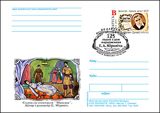 Почтовая карточка Беларуси с оригинальной маркой, посвященная 125-летию со дня рождения Е. А. Мировича.